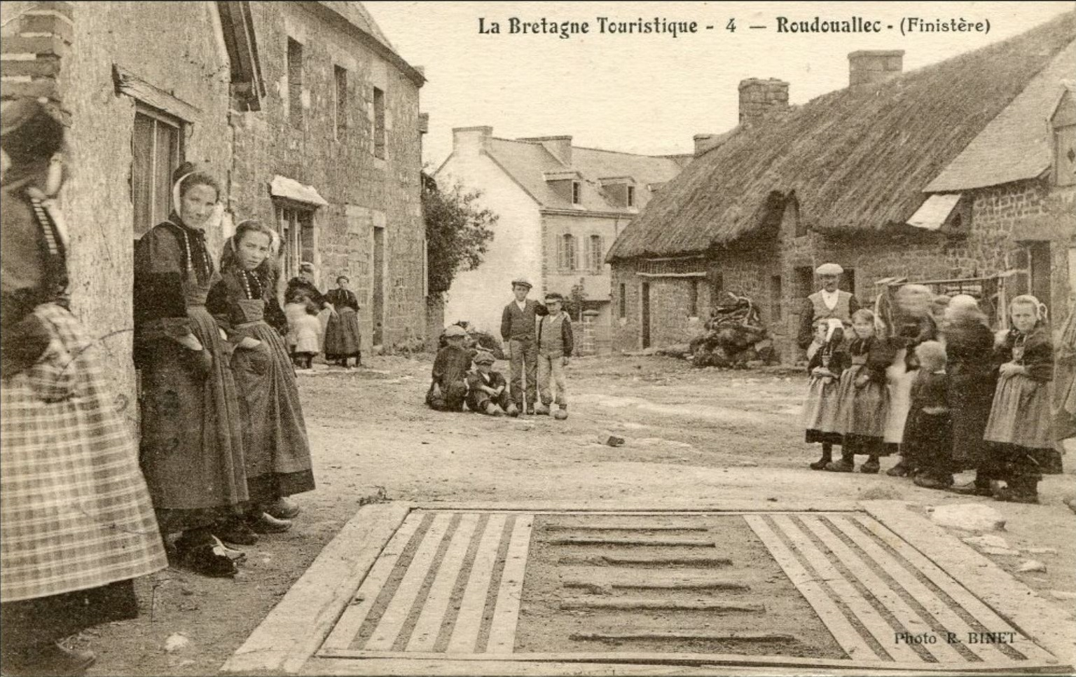 Carte postale du début du XXe siècle montrant le bourg de Roudouallec et quelques-uns de ses habitants en costume traditionnel de l'époque.